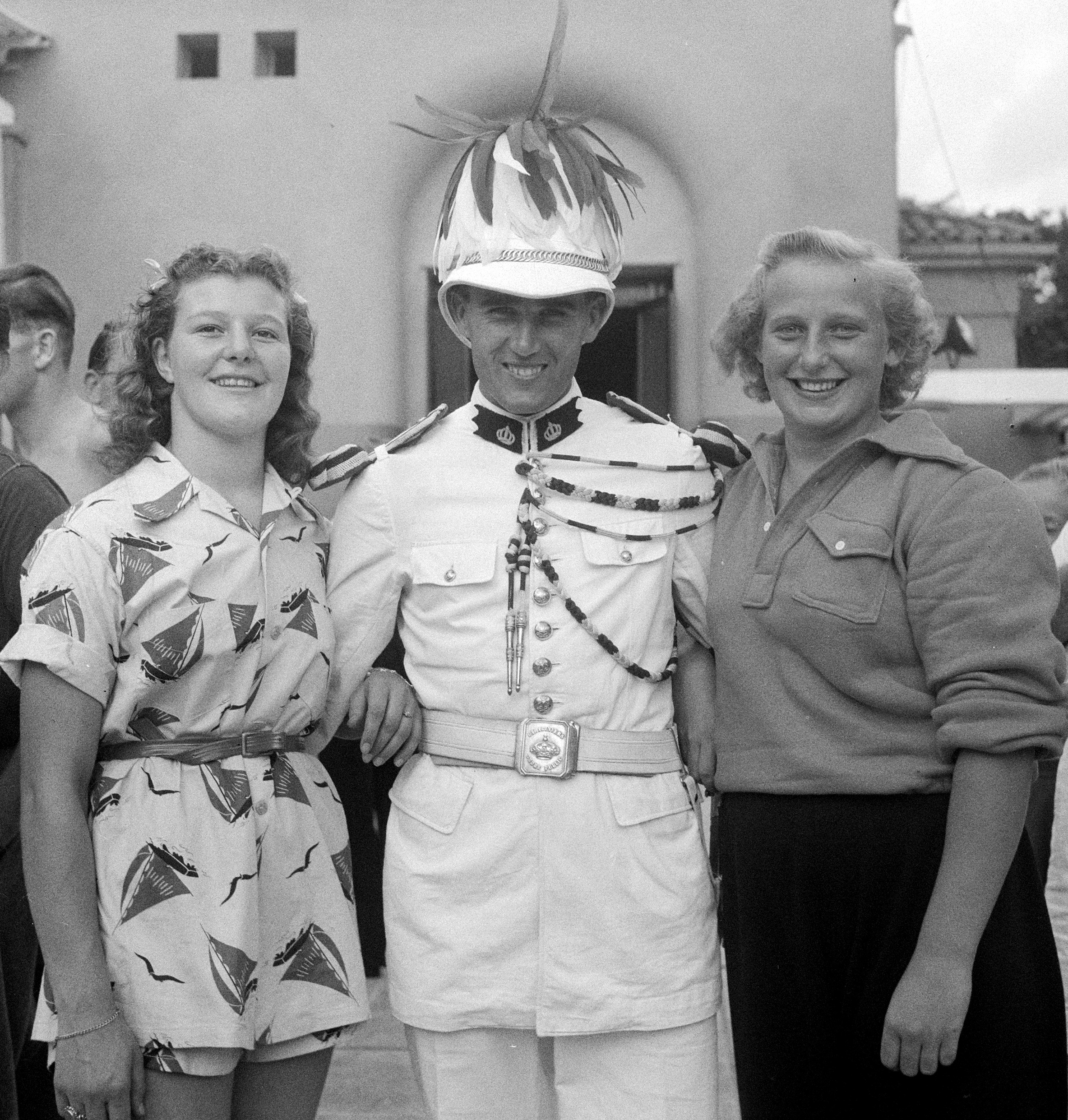 Europese zwemkampioenschappen te Monaco. Nel van Vliet en Hannie Termeulen poseren met een Monegaske militair)